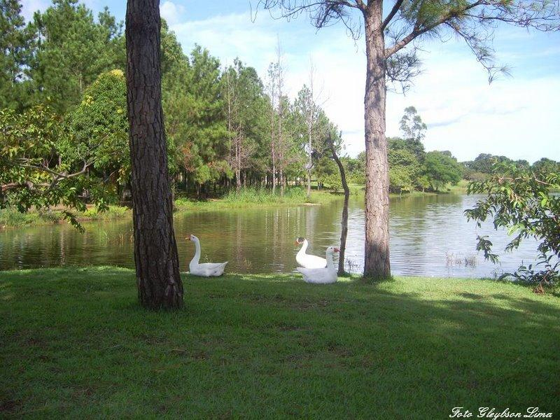 Lago Municipal